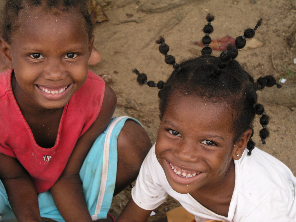 Crianças de São Tomé e Príncipe.